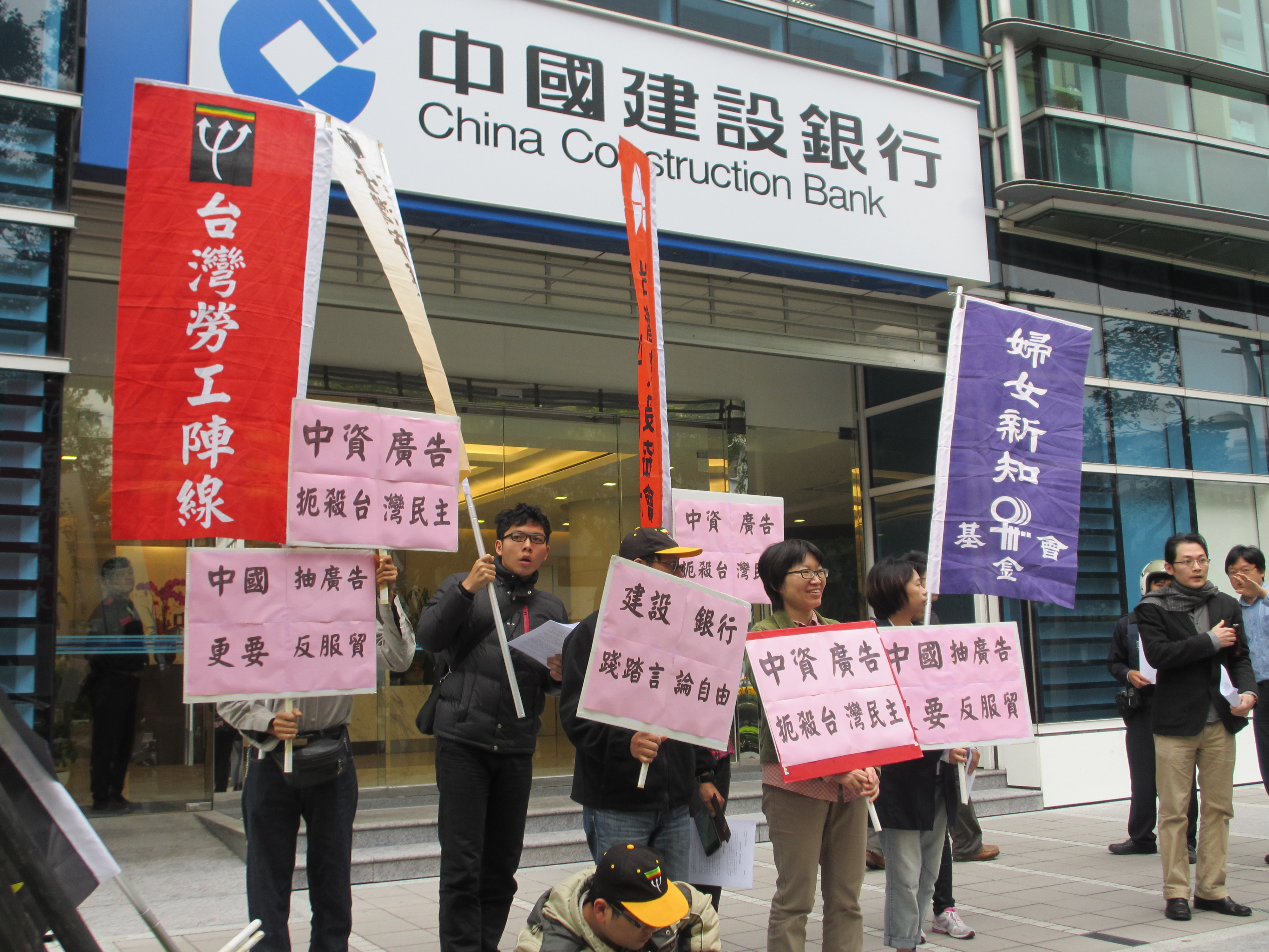 中文（台灣）: 台灣勞工陣線、台灣教授協會、婦女新知基金會於中國建設銀行台北分行前抗議「中資廣告扼殺台灣民主，建設銀行踐踏言論自由」。